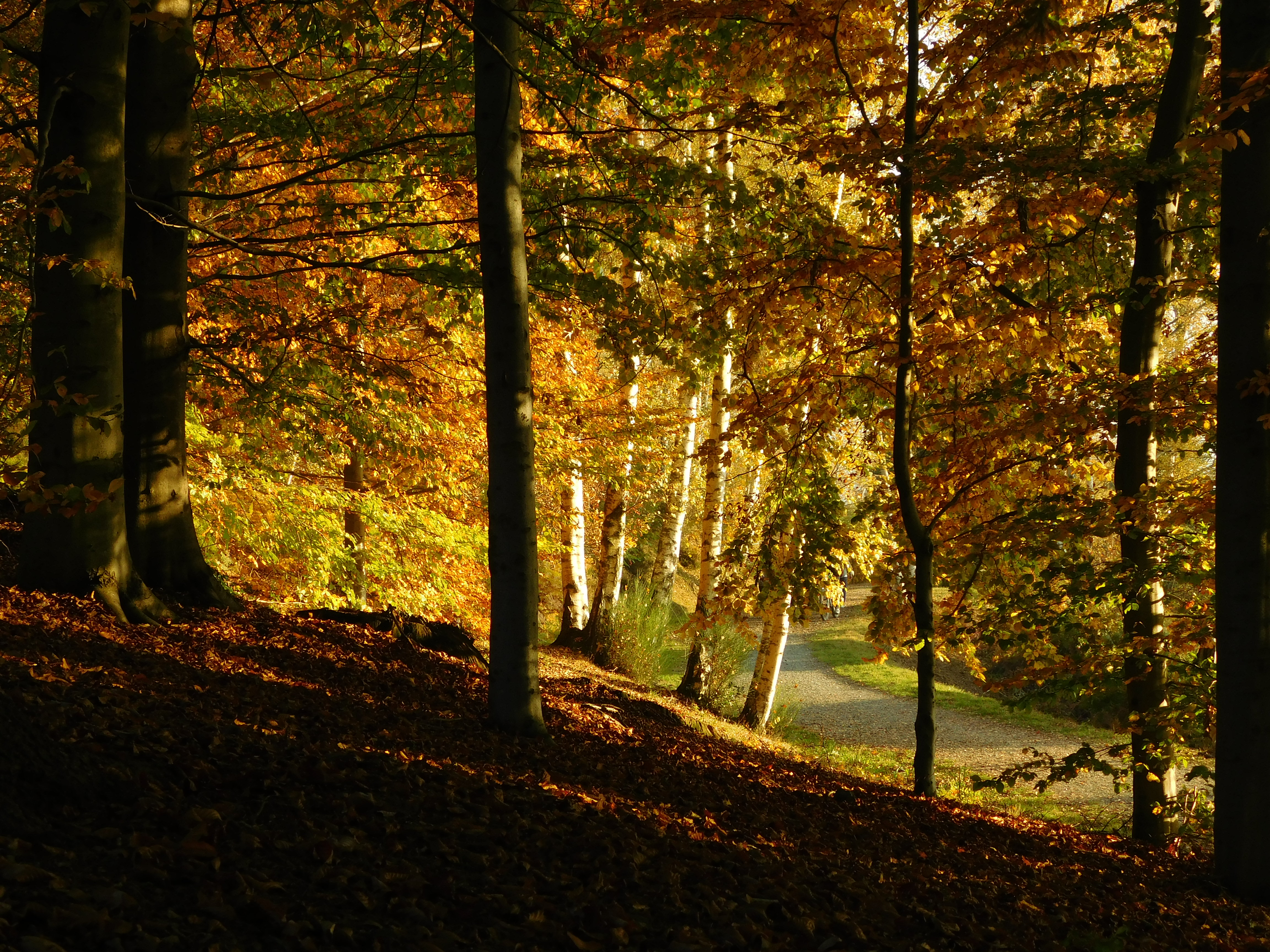 Riserva naturale del Parco Burcina-Felice Piacenza (Q3936914)